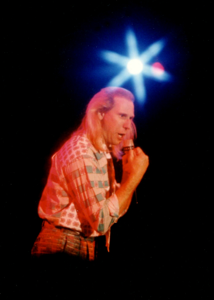 Greg X Volz